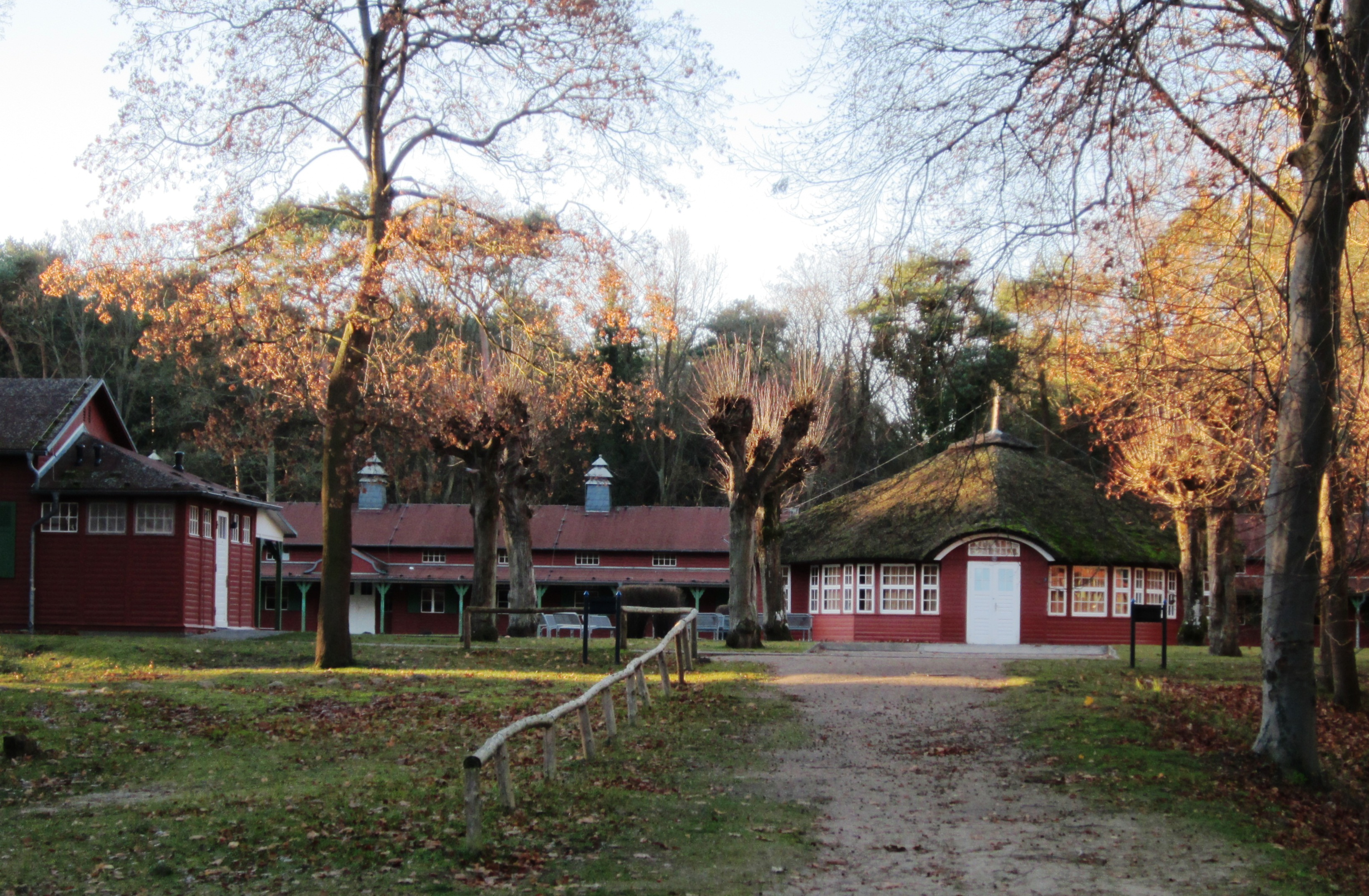 Denkmalgeschütztes Gebäude in Ahlbeck, Dünenstraße 2